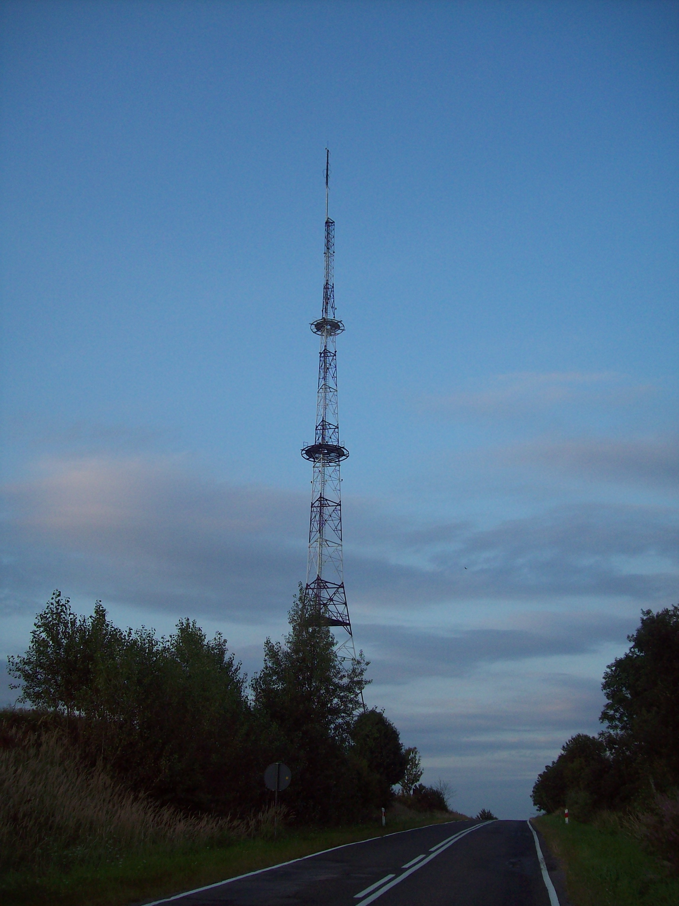 wieża Er Piotrków